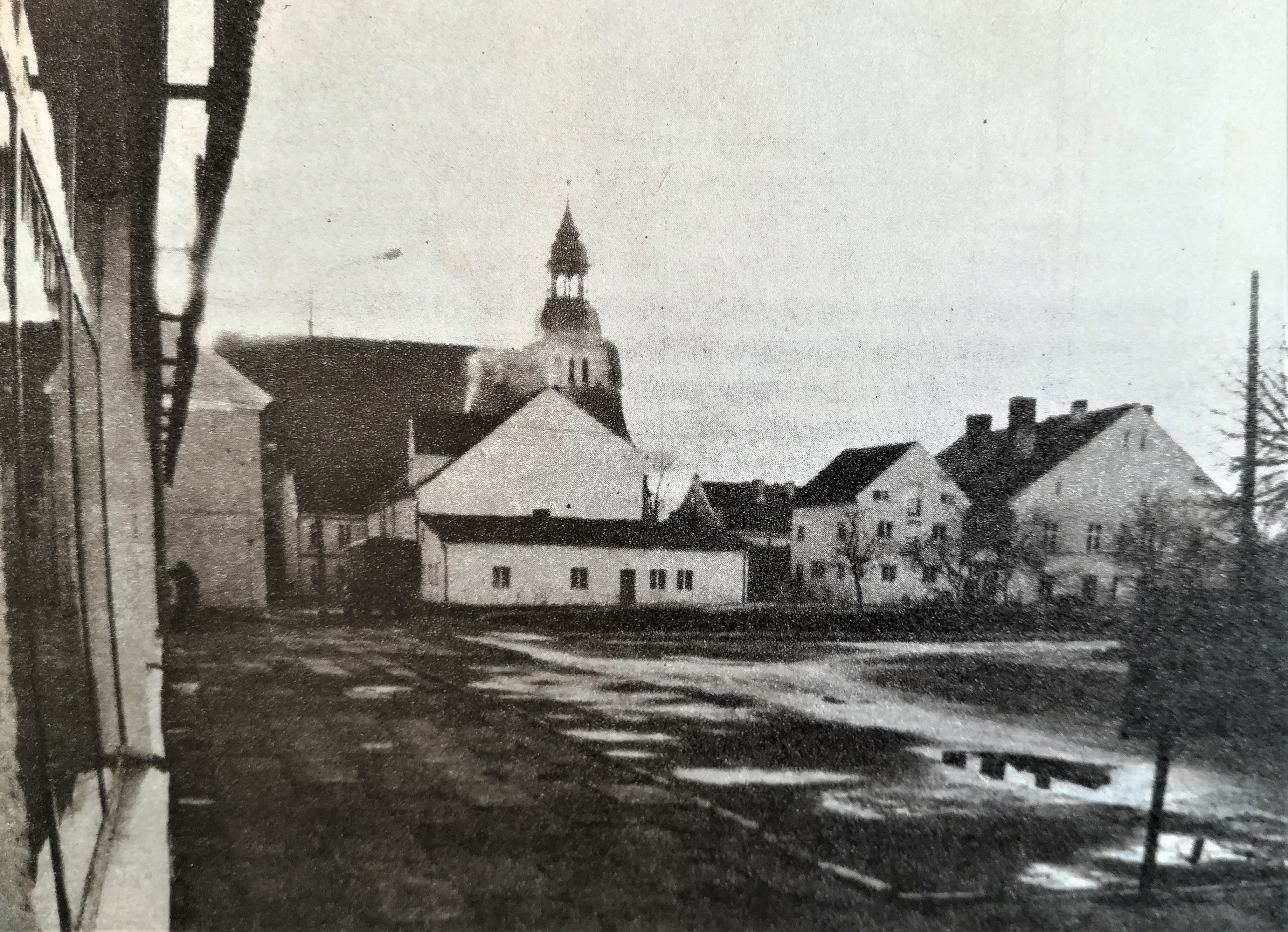 Widok z Bisztynka z 1987 r.